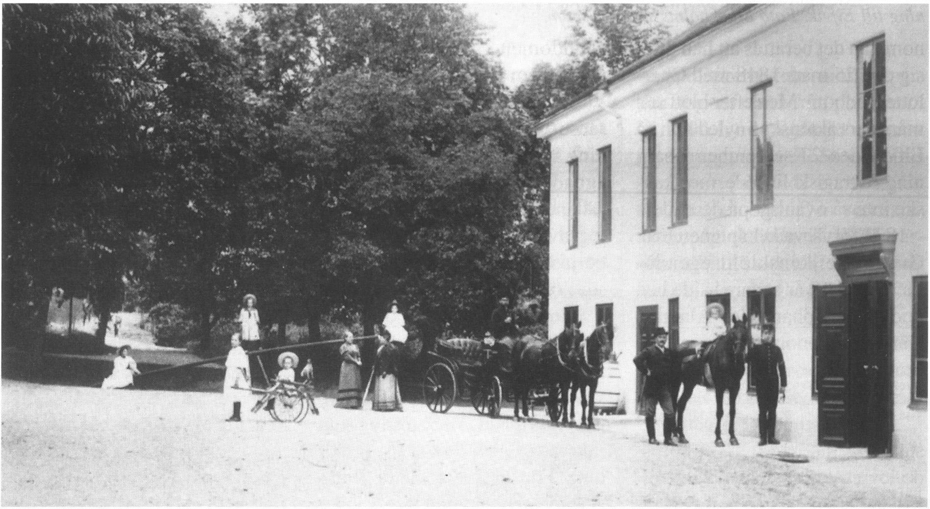 Familjen Albert Janse på Elfviks gård 1895. Albert Janse håller ett vakande öga över hästen medan yngsta barnet Pehr (då 2 år) sitter till häst inför fotograferingen.